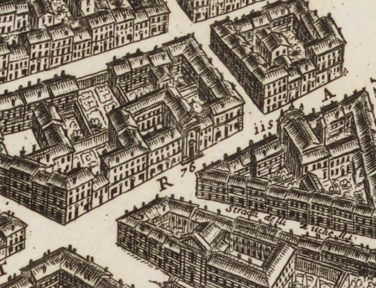 Pianta di Falda, chiesa di Santa Francesca Romana a Strada Felice (76)